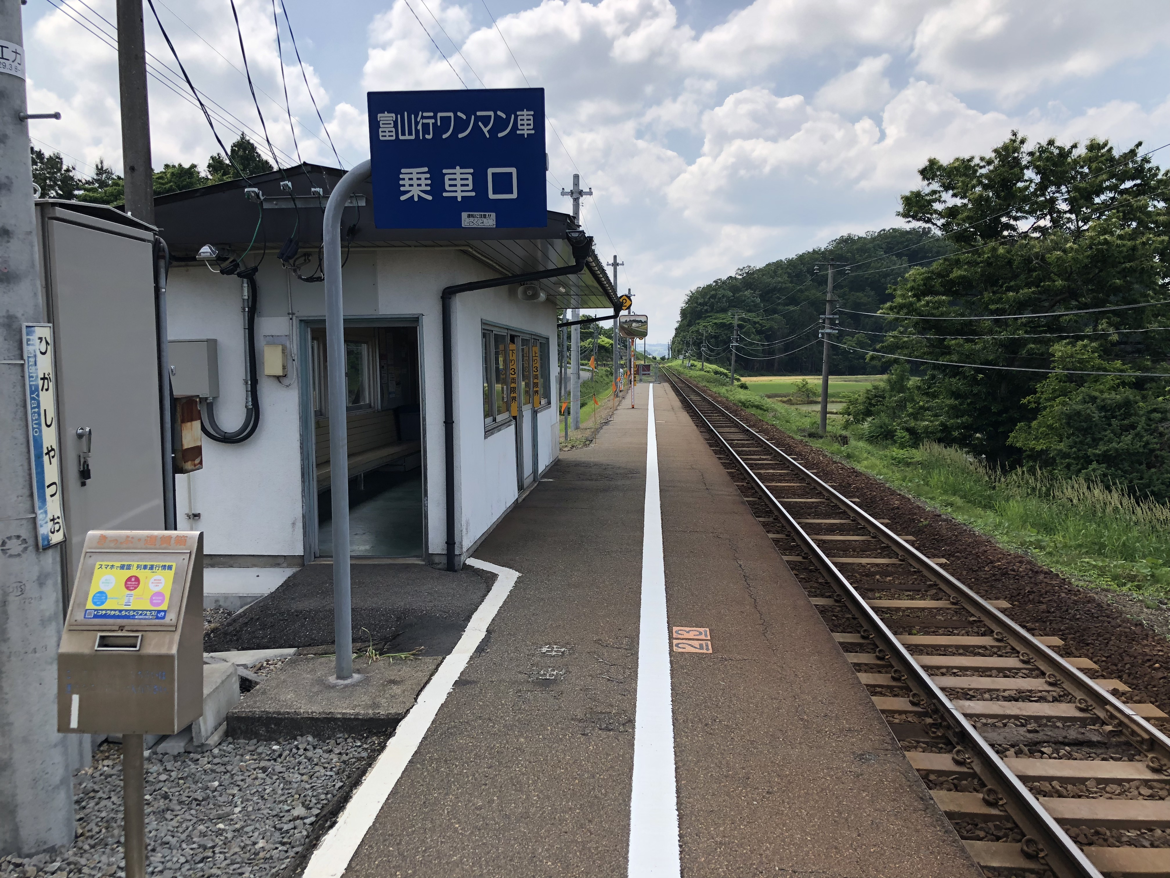 高山本線東八尾駅ホーム